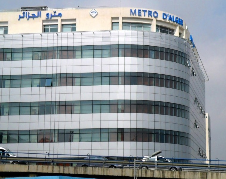 Poste de Commande Centralisé du Métro d'Alger